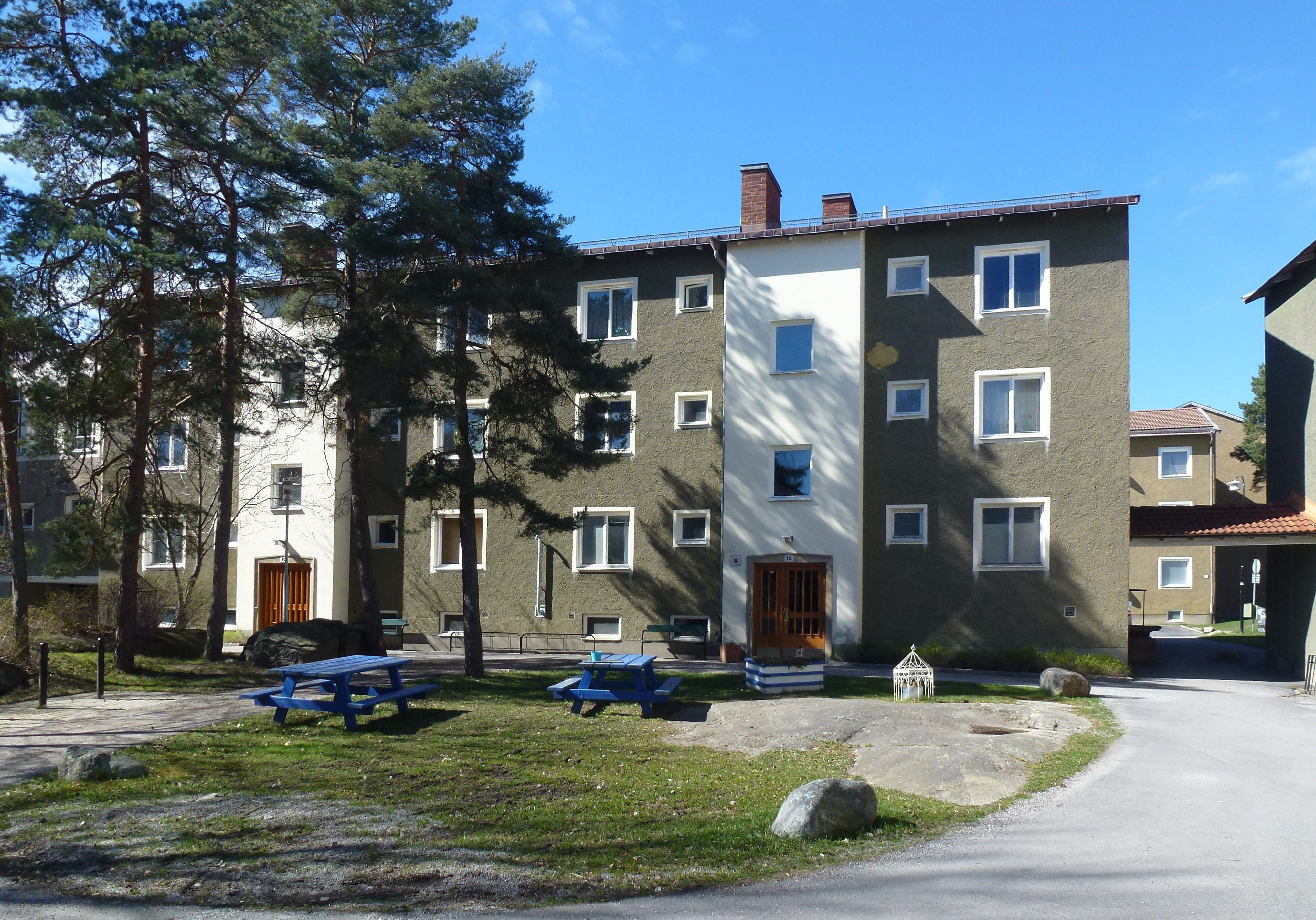 Kaj Munks väg 10-12, Bromma, arkitekt Curt Laudon och Curt Strehlenert